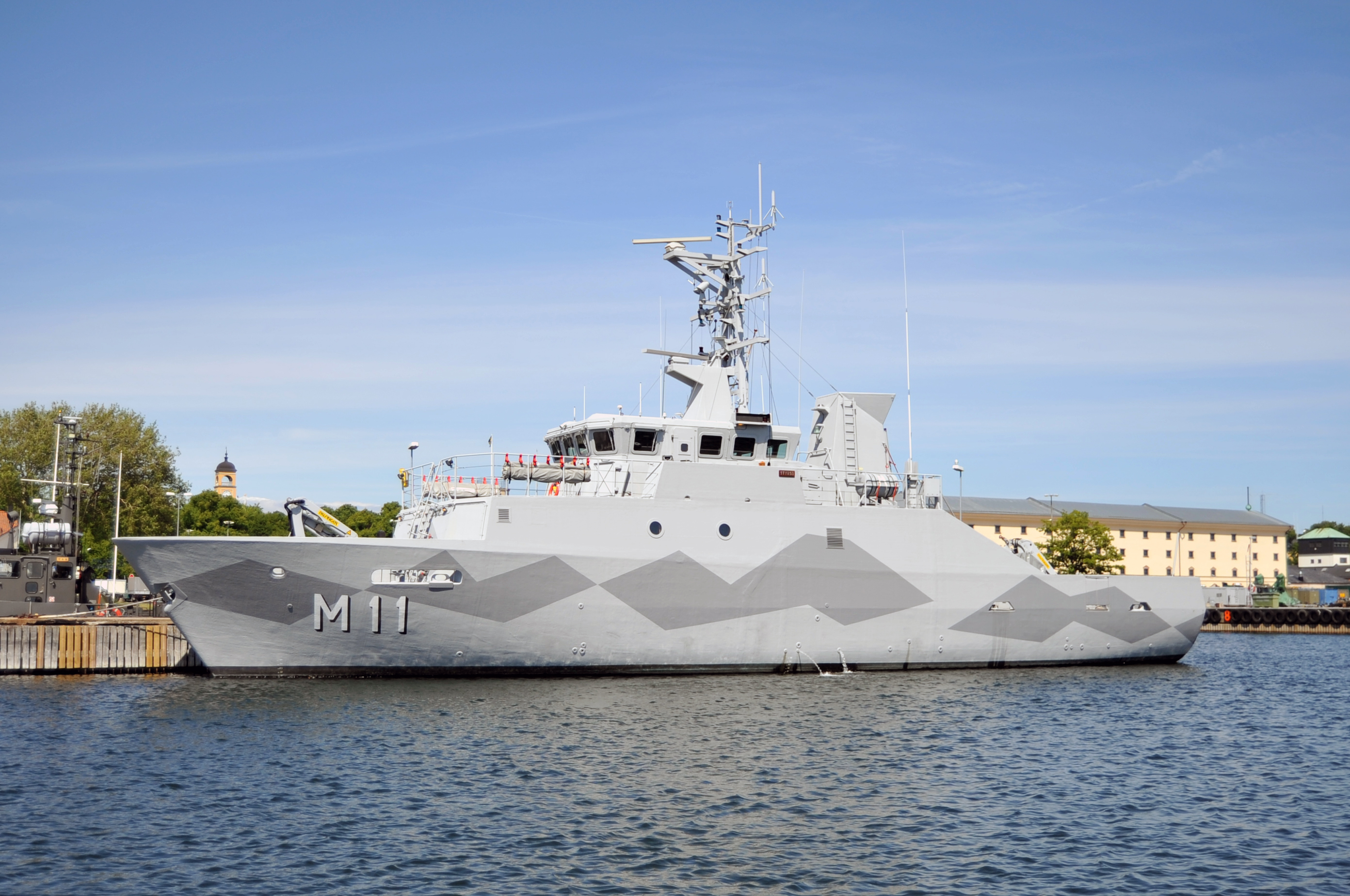 HMS Styrsö